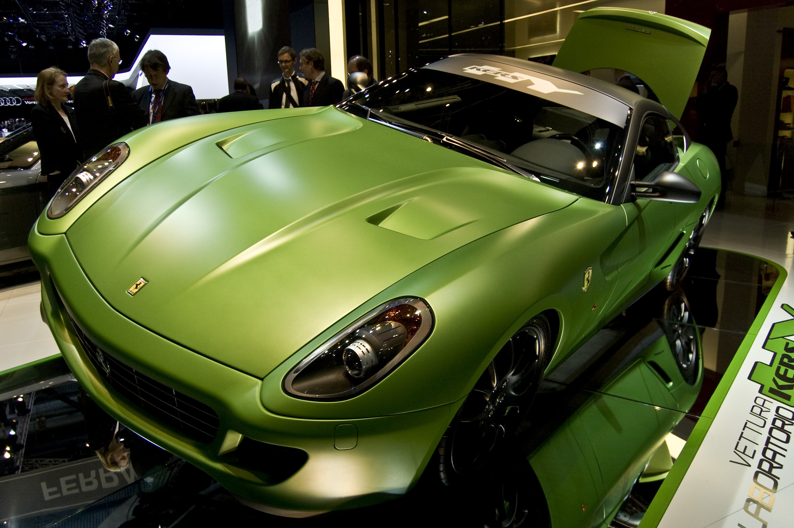 Ferrari 599 HY KERS en el Salón de Ginebra 2010.